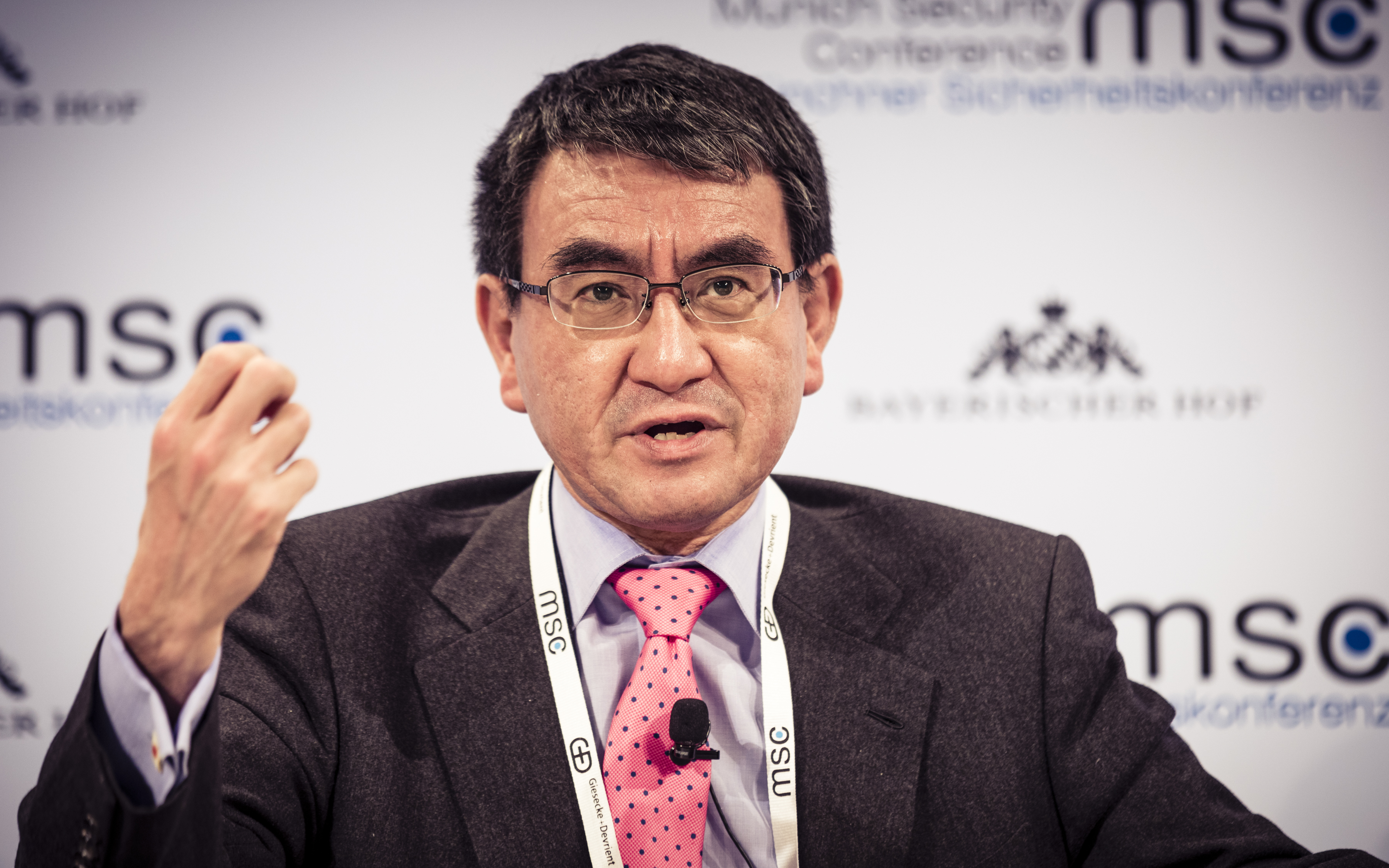 Tarō Kōno während der Münchener Sicherheitskonferenz 2019